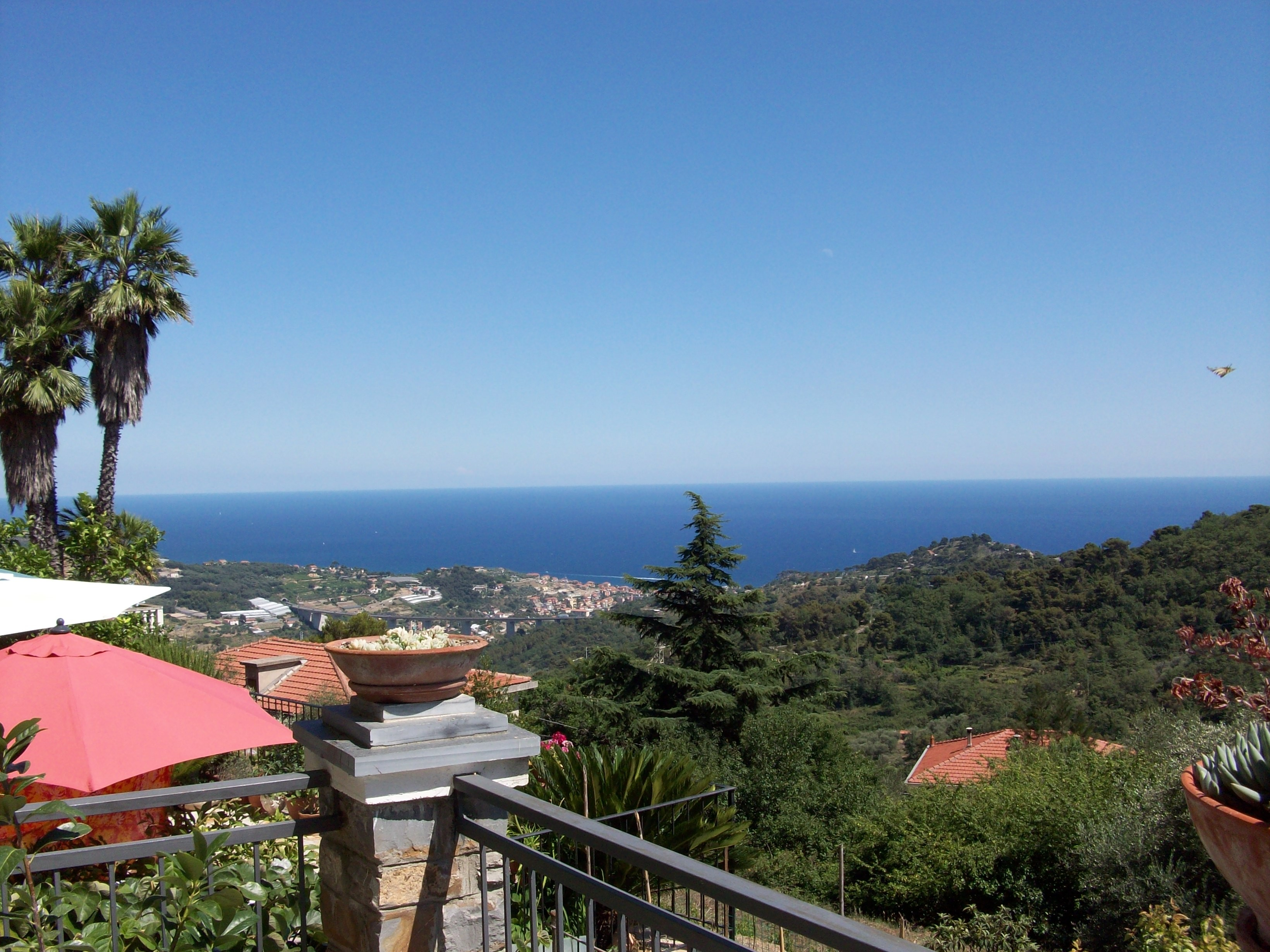 Blick vom Feriendorf Lingueglietta auf den Küstenort San Lorenzo al Mare